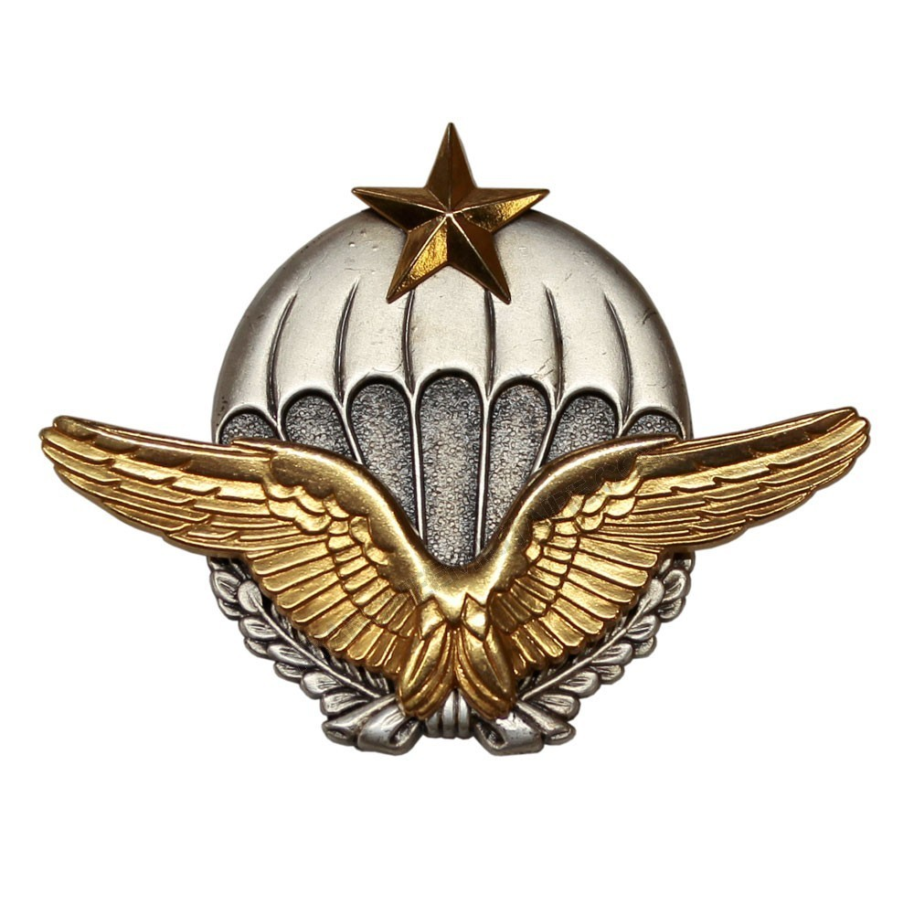 BMP de l'armée de l'air